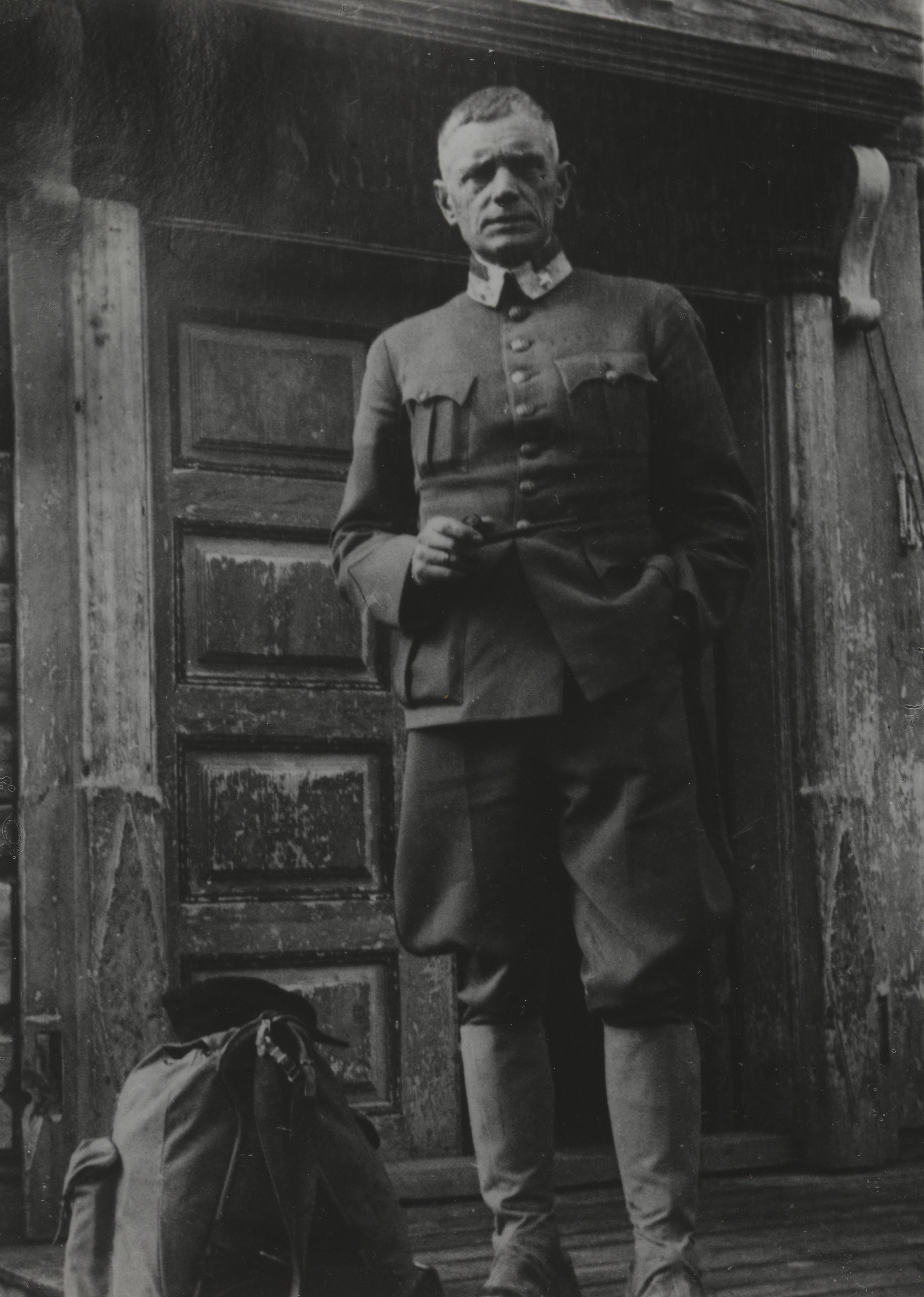 Bildet er hentet fra Nasjonalbibliotekets bildesamling. Anmerkninger til bildet var: Fotgraf usikkert. Målselv, Troms Depicted person: Ruge, Otto